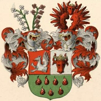 Wettbergi suguvõsa aadli- ja parunivapp